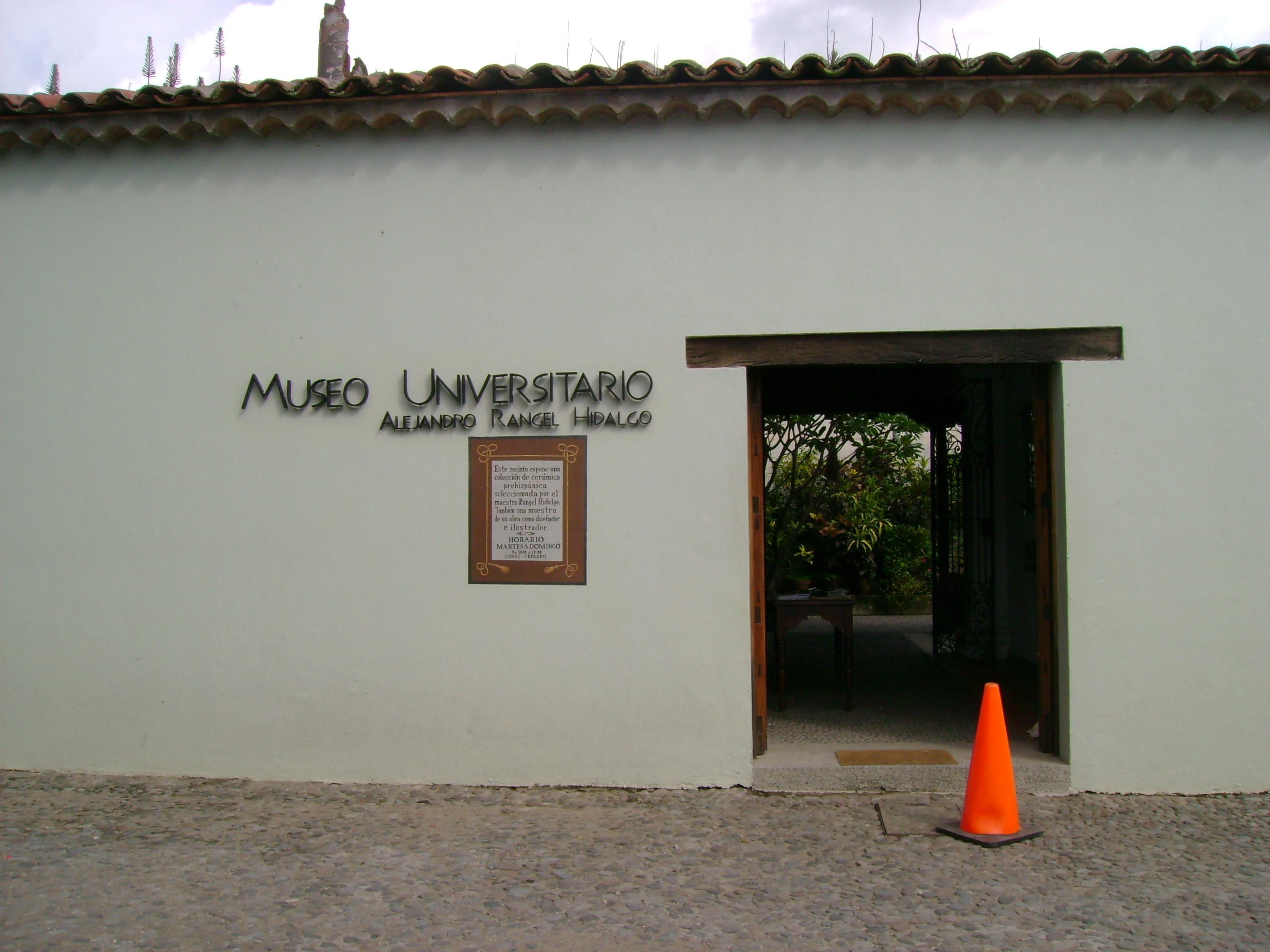 Fotografía de la fachada del Museo Universitario Alejandro Rangel Hidalgo, en el poblado de Nogueras, municipio de Comala en Colima.